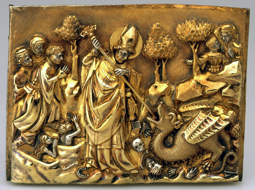 Museum für Kunst und Gewerbe, Hamburg, Inventarnummer 1885.1195, erworben aus dem Vermächtnis Johann Jacob David Neddermann, Hamburg. Aus Dankbarkeit für eine Heilung stiftete Herzog Heinrich von Bayern (1386-1450) 1403 der Servatiuskirche in Maastricht eine Reliquienbüste. Sie zeigt den Heiligen Servatius, der 384 als Bischof von Tongern starb. Die acht silbervergoldeten Reliefplatten zierten ursprünglich den achteckigen Sockel der nicht mehr erhaltenen Büste. Objekt (pro Platte): Höhe: 10,70 cm; Breite: 13,80 cm; Tiefe: 2,50 cm. Mit großer Erzählfreude und realistischer Genauigkeit zeigen die Reliefs Begebenheiten aus der Legende des Heiligen: hier, der Sieg über einen Drachen.